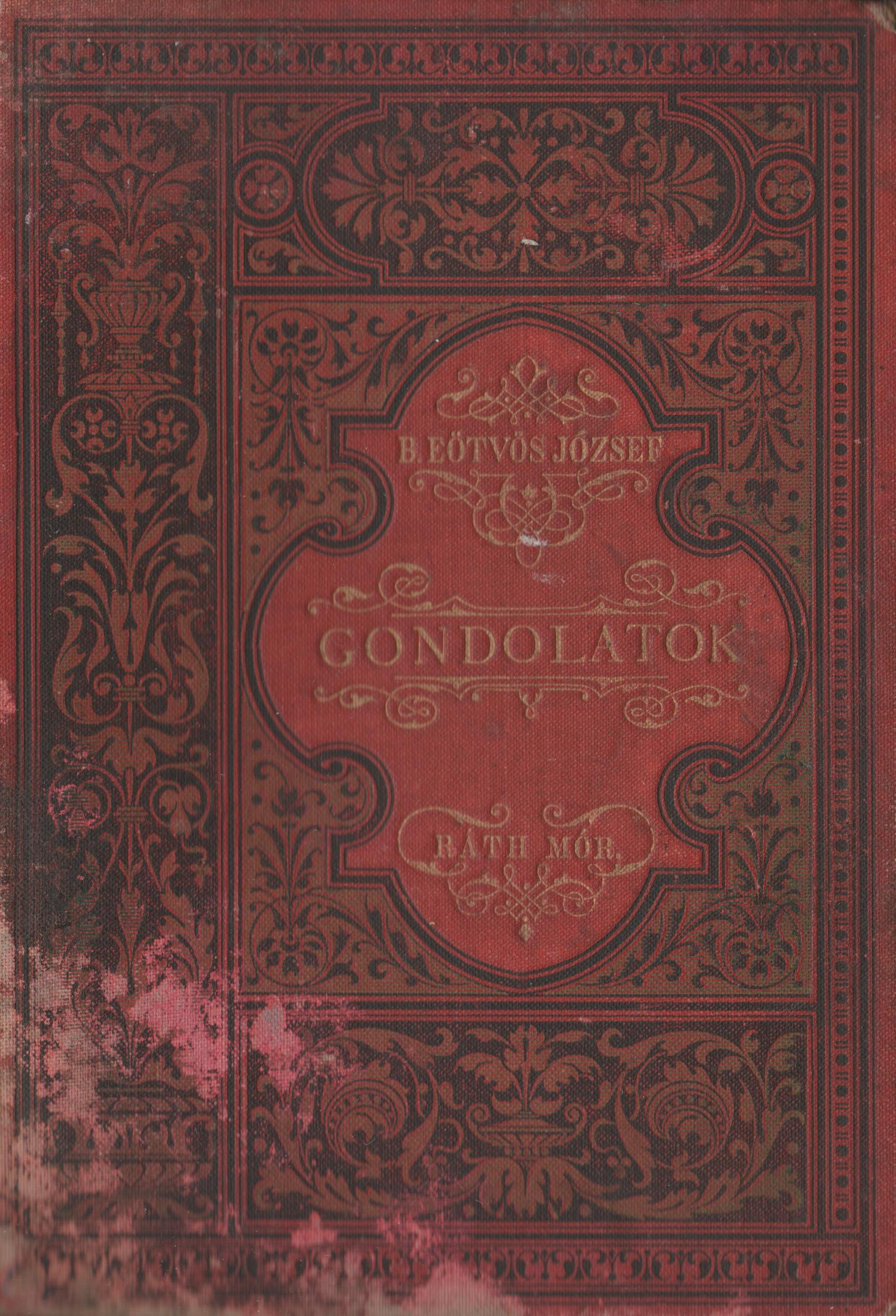 Az adott mű borítója.